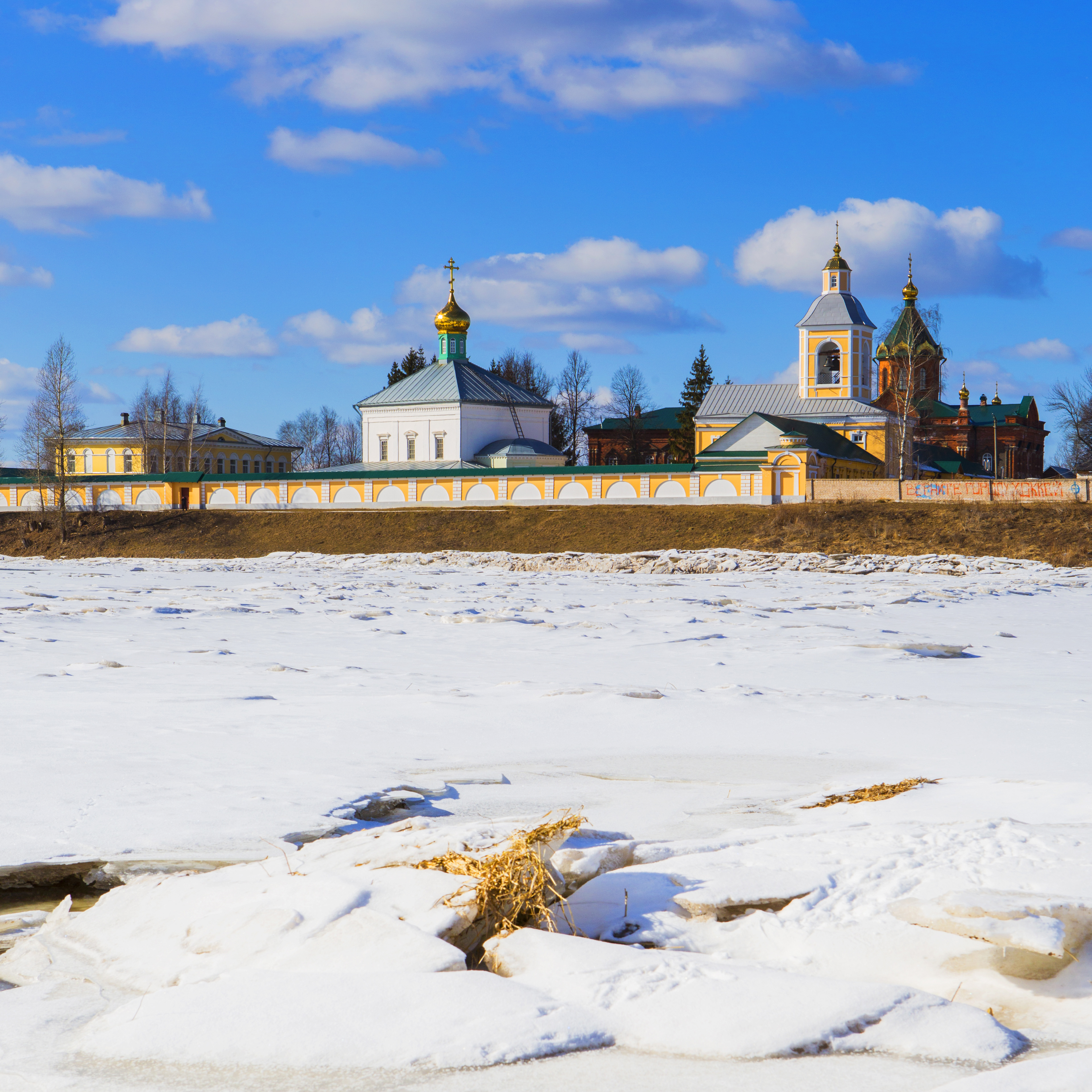 Монастырь Свято-Духов: улица Александра Невского, Боровичи, Новгородская область